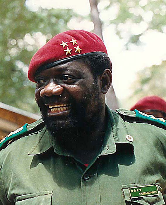 Sujet: Jonas Savimbi Source: Eege Foto (1989) vum user ernmuhl Lizenz; GDFL